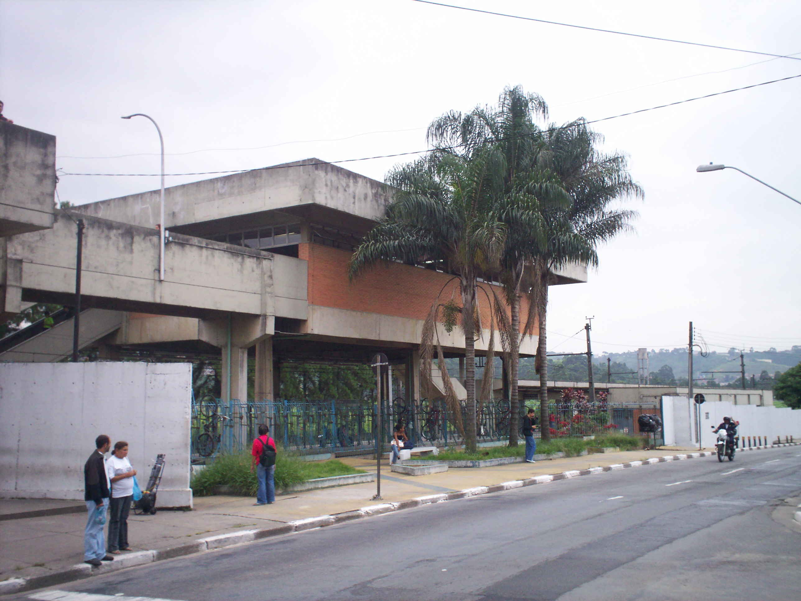 Prédio atual da estação Jardim Silveira (linha 8 da CPTM), inagurado em 11 de março de 1983 pela então FEPASA.